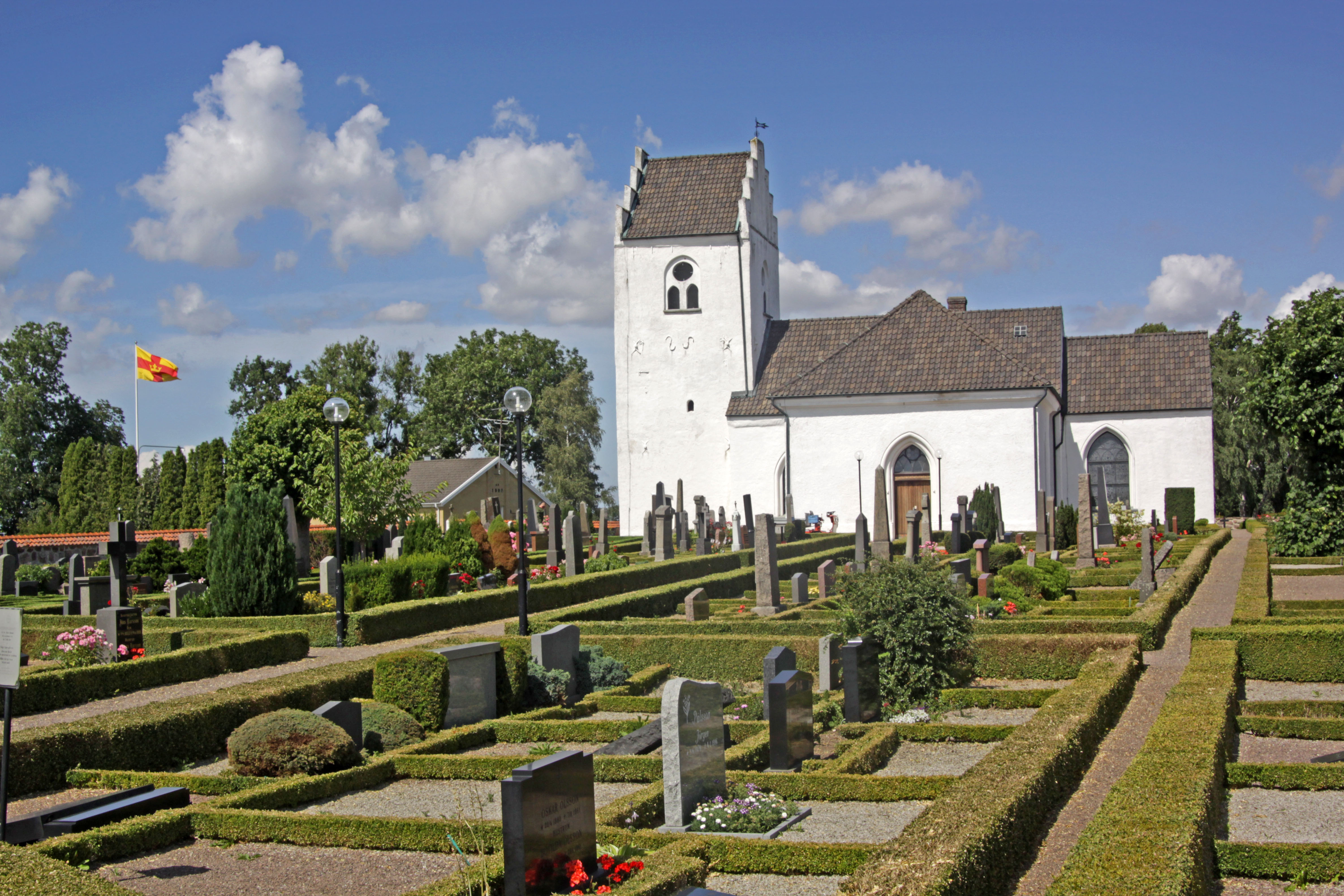 Helsingborg. Kvistofta Kyrka.